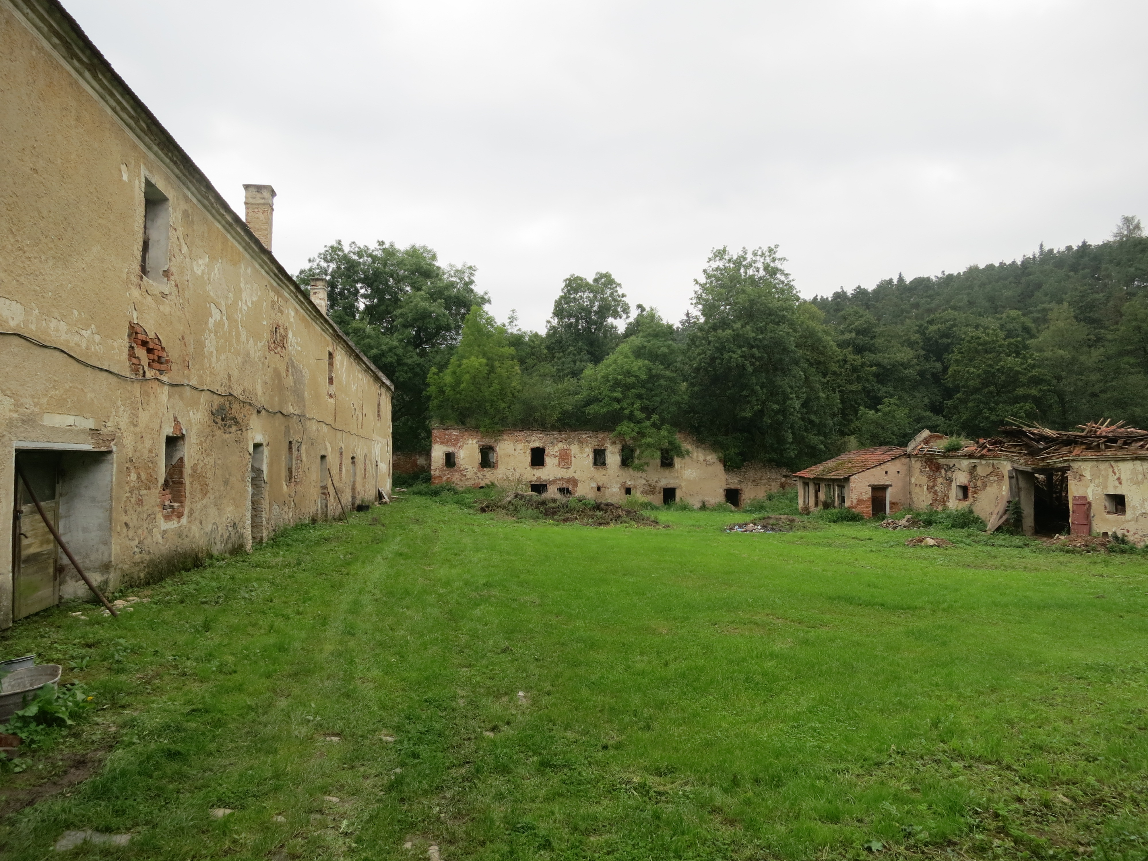 Nádvoří dvora Alinkova s budovou bývalé sladovny vlevo a zříceninami někdejšího zámku v pozadí